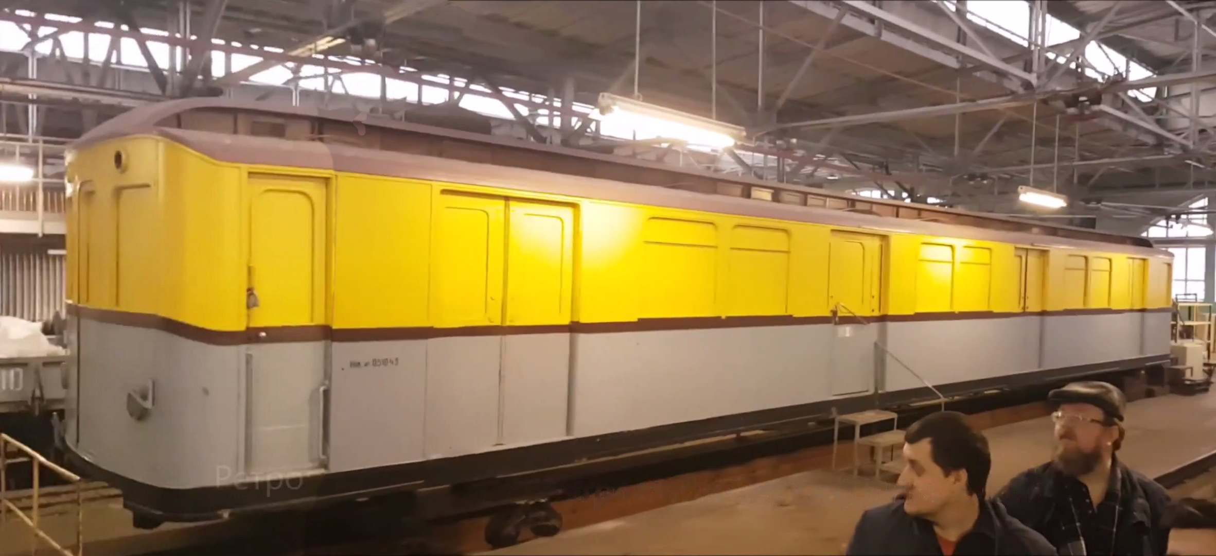 Четырёхдверный электровагон типа В4 в депо Красная Пресня